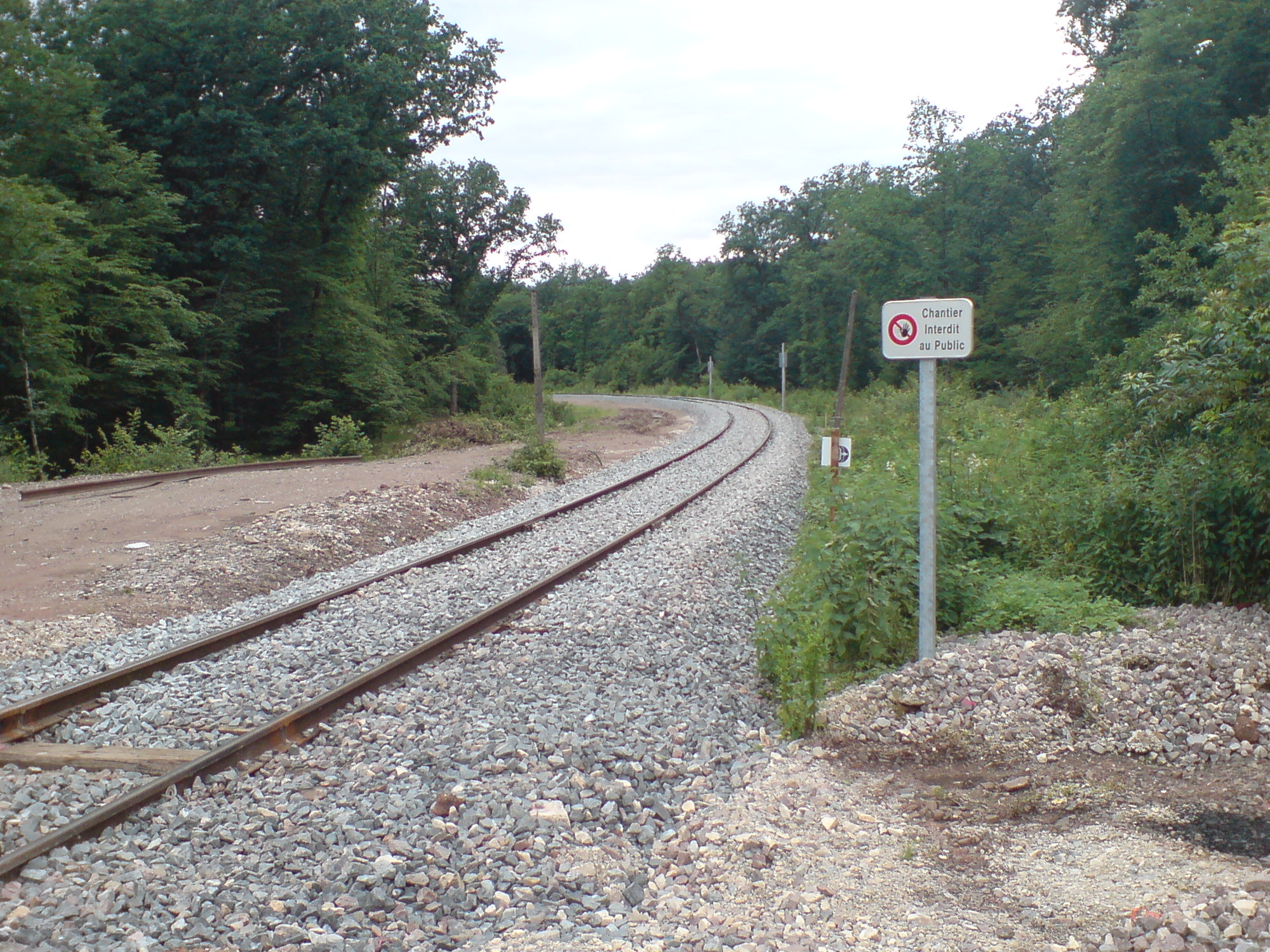 Réhabilitation du tronçon de la ligne de Montbozon à Lure désaffecté.